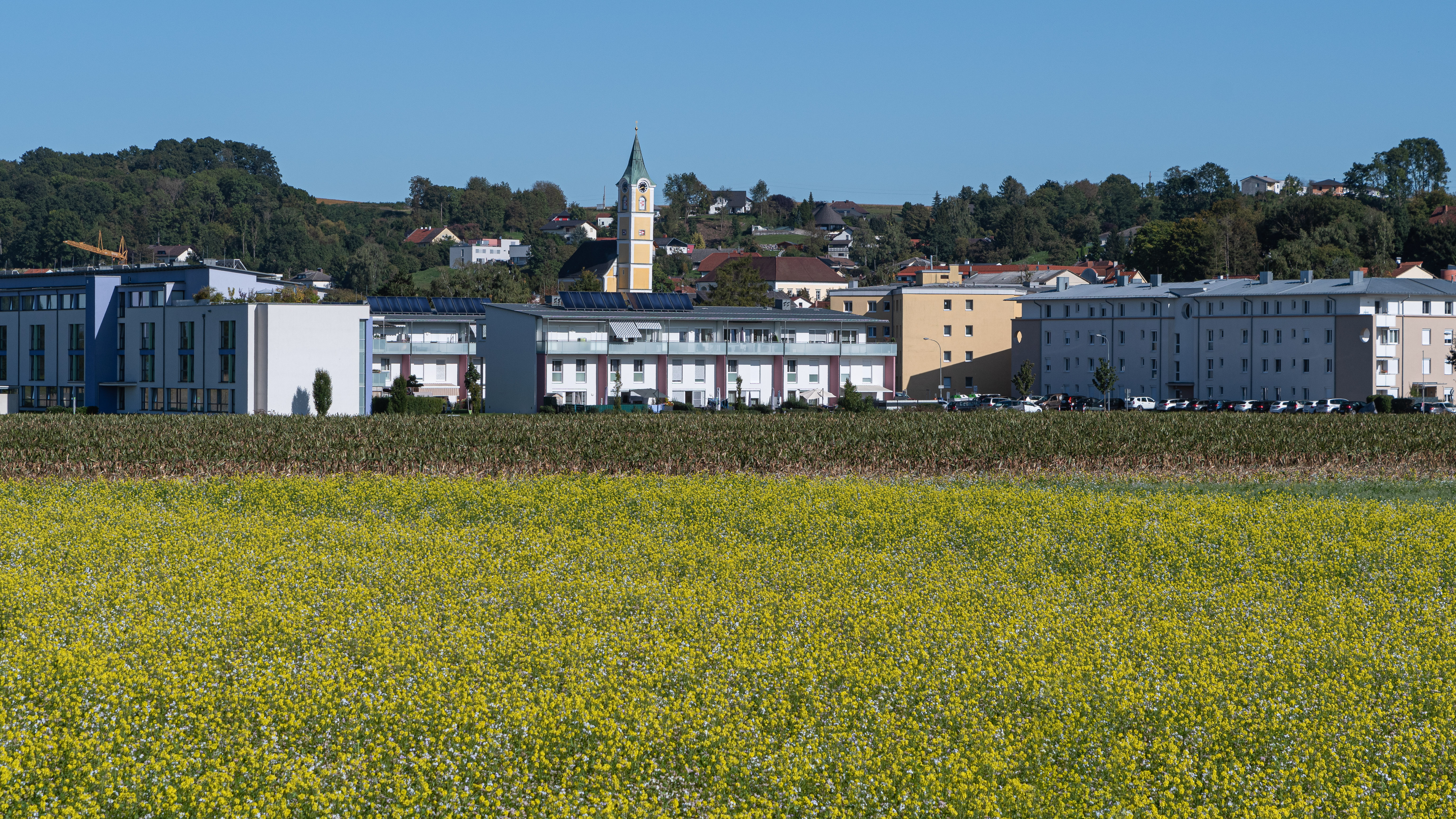 Ansicht der Gemeinde Ansfelden von der Ritzelhofstraße nach Osten